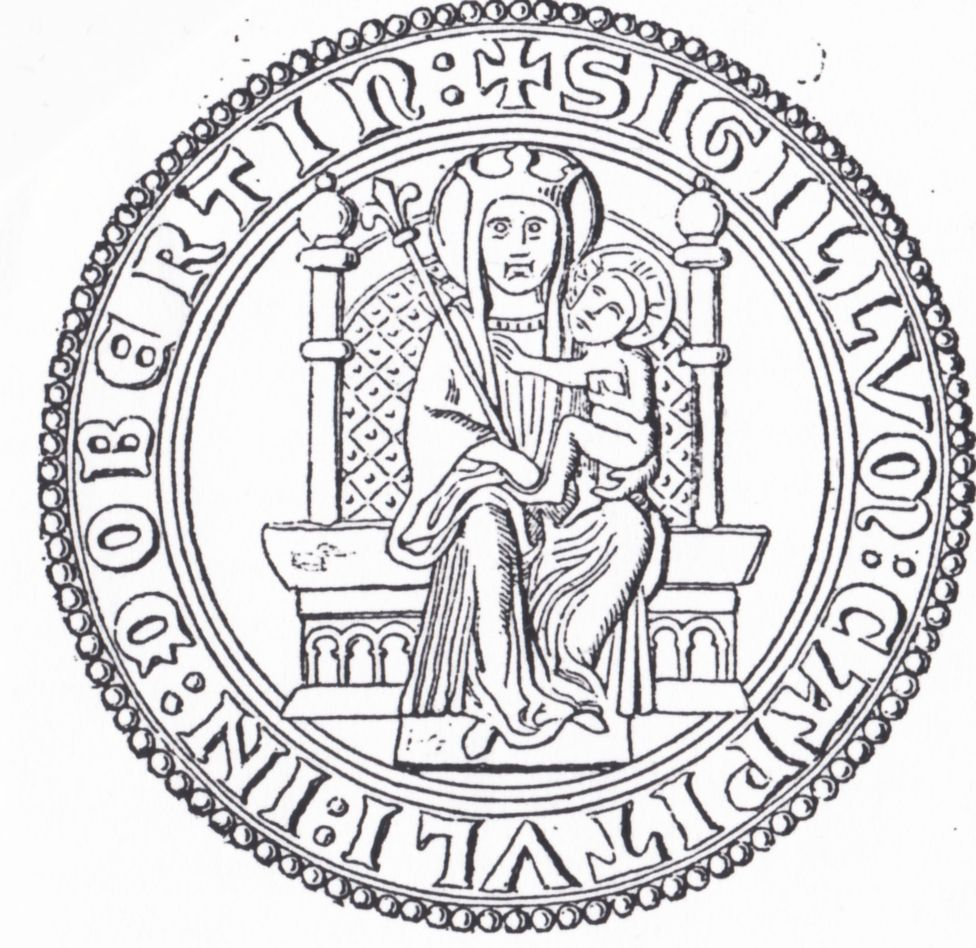 Das erste Klostersiegel des Klosters Dobbertin von 1249, Holzschnitt